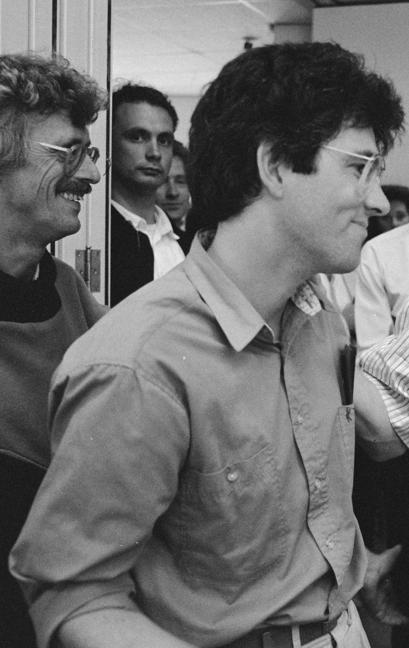 Collectie / Archief : Fotocollectie Anefo Reportage / Serie : Congres van de PSP in Amsterdam met de vaststelling van de kandidaten voor de verkiezingen Beschrijving : Wilbert Willems (midden) en Tom Pitstra Datum : 1 juli 1989 Locatie : Amsterdam, Noord-Holland Trefwoorden : congressen, kandidaten, politiek, verkiezingen Persoonsnaam : Pitstra, Tom, Willems, Wilbert Instellingsnaam : PSP Fotograaf : Bogaerts, Rob / Anefo Auteursrechthebbende : Nationaal Archief Materiaalsoort : Negatief (zwart/wit) Nummer archiefinventaris : bekijk toegang 2.24.01.05 Bestanddeelnummer : 934-4771